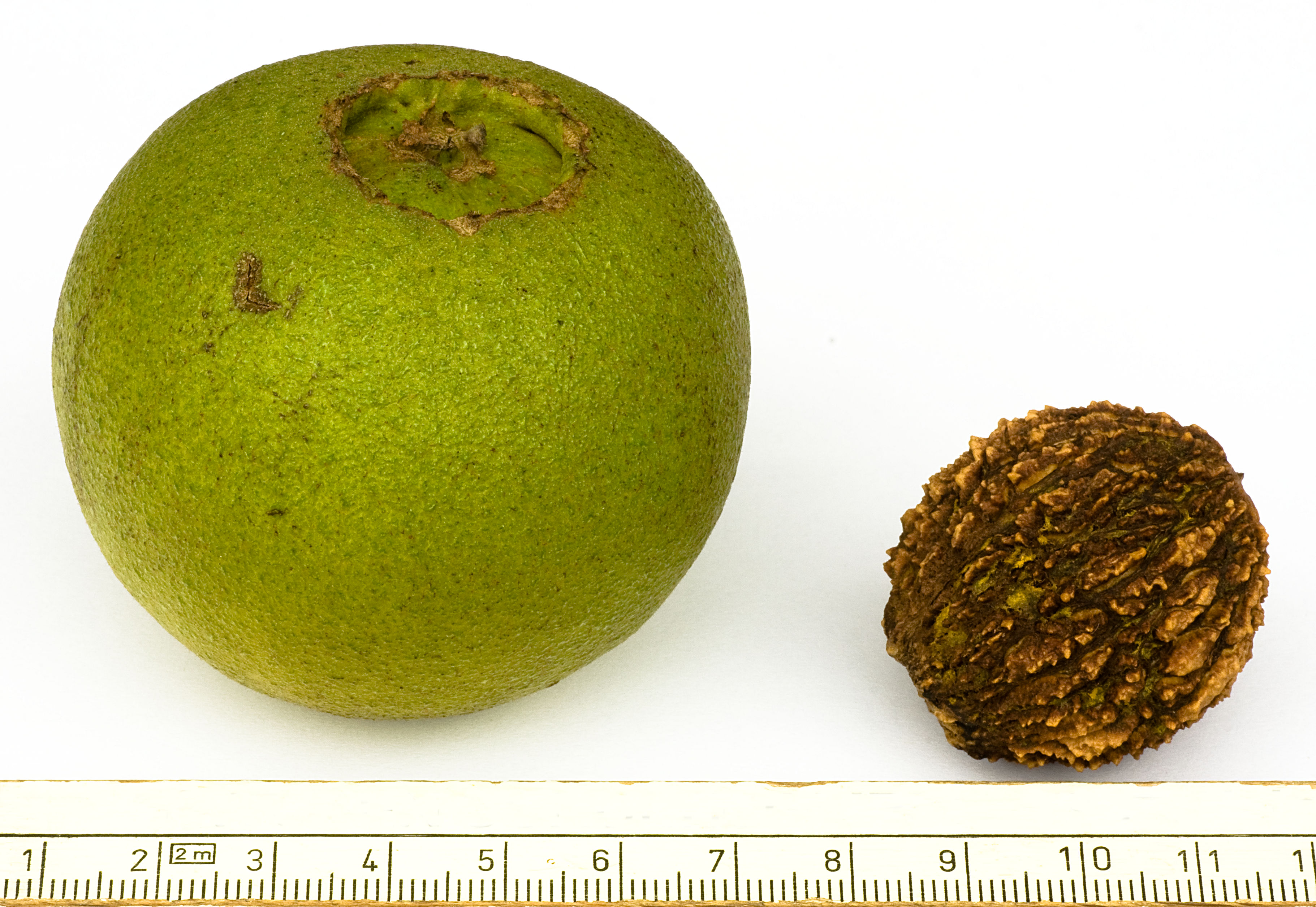 Schwarznuss (Juglans nigra), Frucht